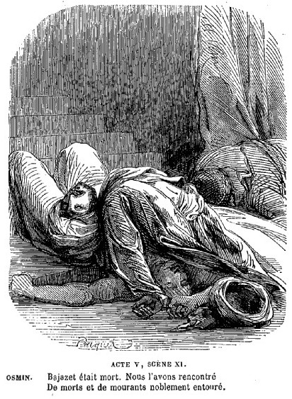 Illustration par Pauquet de la tragédie Bajazet de Racine, dans le Panthéon populaire illustré, 2e série, 1851